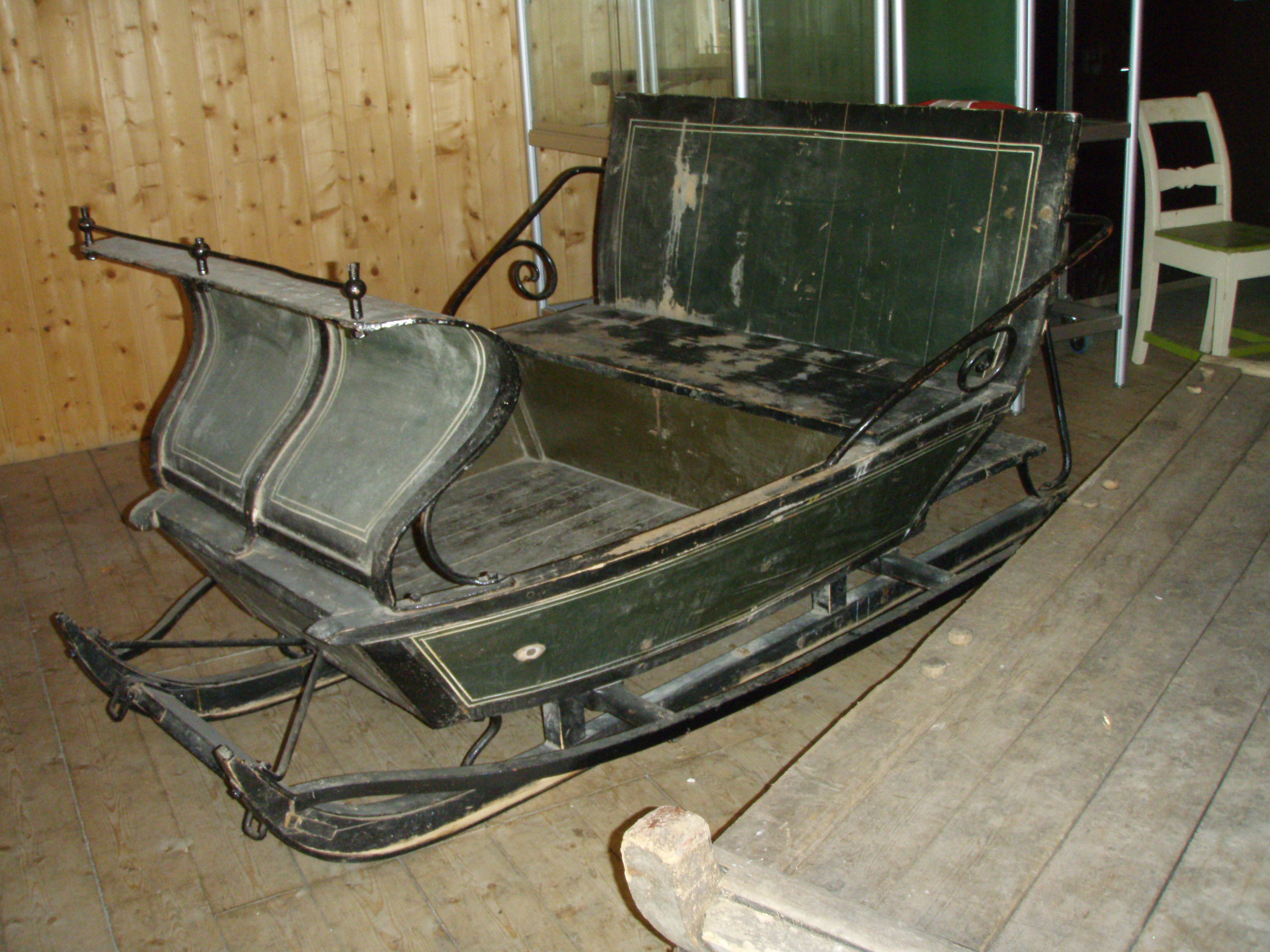 Sleigh for person-transport